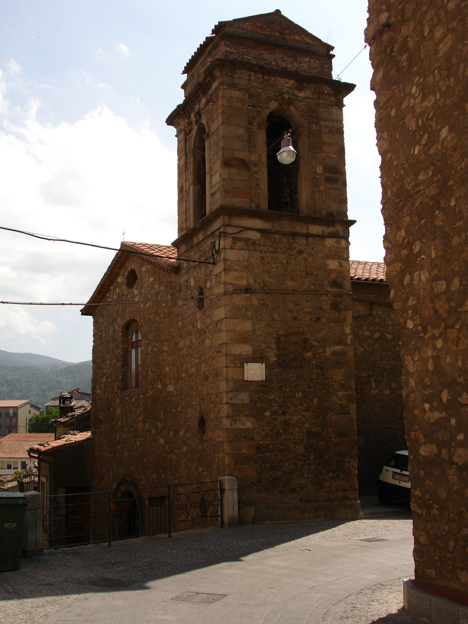 Chiesa dell'Annunziata. Facciata e campanile